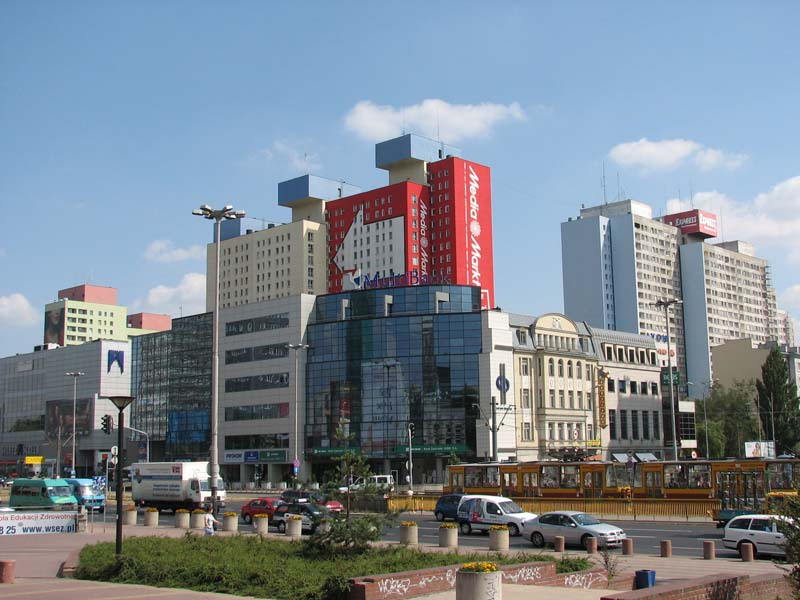 Śródmiejska Dzielnica Mieszkaniowa w Łodzi (tzw. łódzki Manhattan) - zespół największych w Polsce budynków mieszkalnych (megaszaf) wykonanych w technologii tzw. "wielkiej płyty". Widok od strony północnej.